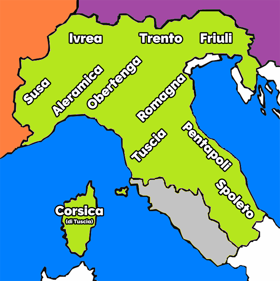 Regnum Italiae, in epoca di Lotario II, e sue regioni